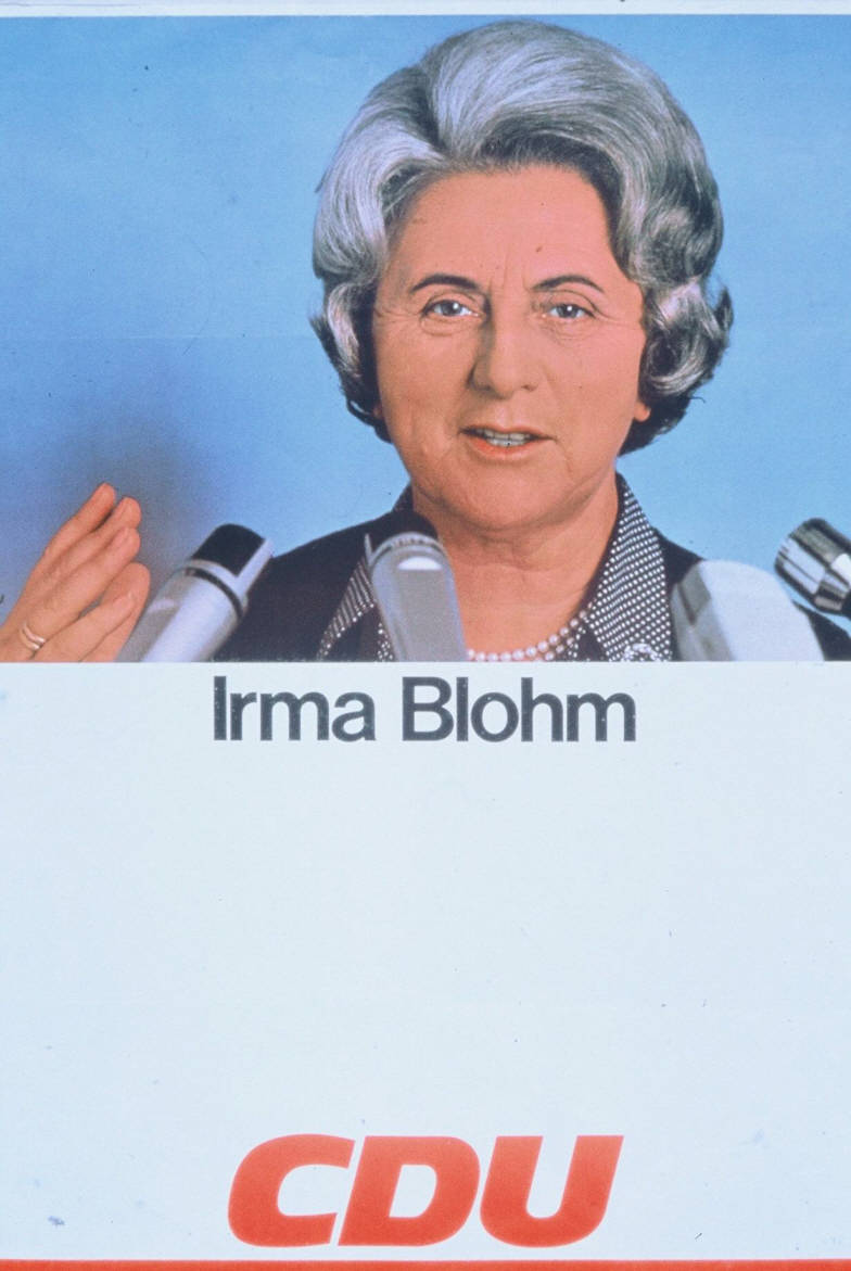 Irma Blohm CDUAbbildung:PorträtfotoPlakatart:Kandidaten-/Personenplakat mit PorträtObjekt-Signatur:10-001: 1714Bestand:Plakate zu Bundestagswahlen (10-001)GliederungBestand10-18:Plakate zu Bundestagswahlen (10-001) » Die 7. Bundestagswahl am 19. November 1972 » CDU » Mit PorträtfotoLizenz:KAS/ACDP 10-001: 1714 CC-BY-SA 3.0 DE